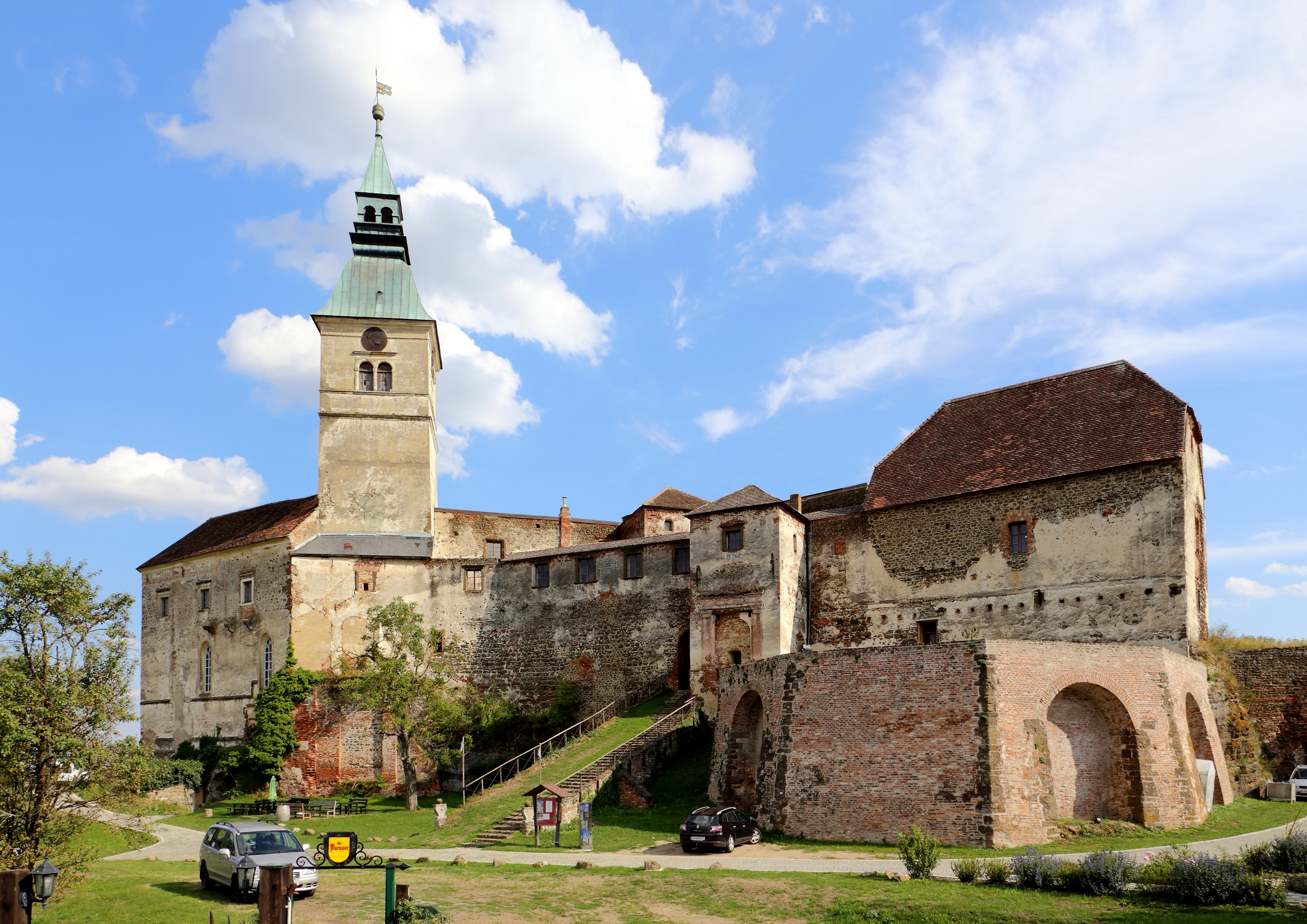 Nordwestansicht der Burg Güssing mit Standort Burghof. Mitte des 12. Jahrhunderts errichtete Burg und damit älteste Burgenlands. Im 16. und 17. Jahrhundert erfolgte der Ausbau zu einer Festung. Wegen der "Dachsteuer" gab man sie im 18. Jahrhundert dem Verfall preis. Seit 1957 wird eine Bestandssicherung betrieben und 1969 wurde das neue Burgmuseum eröffnet.